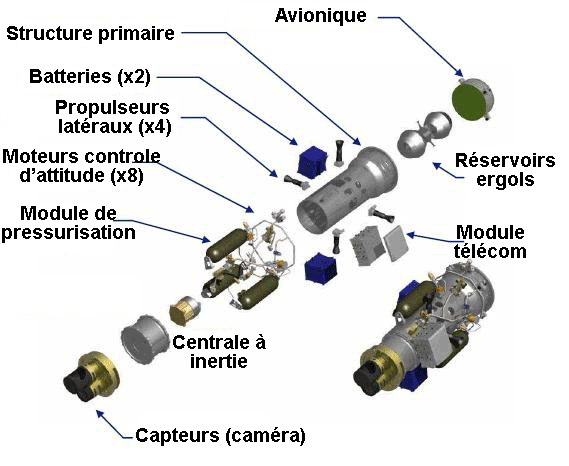 Schéma éclaté du satellite expérimental XSS-10 avec des libellés en francais